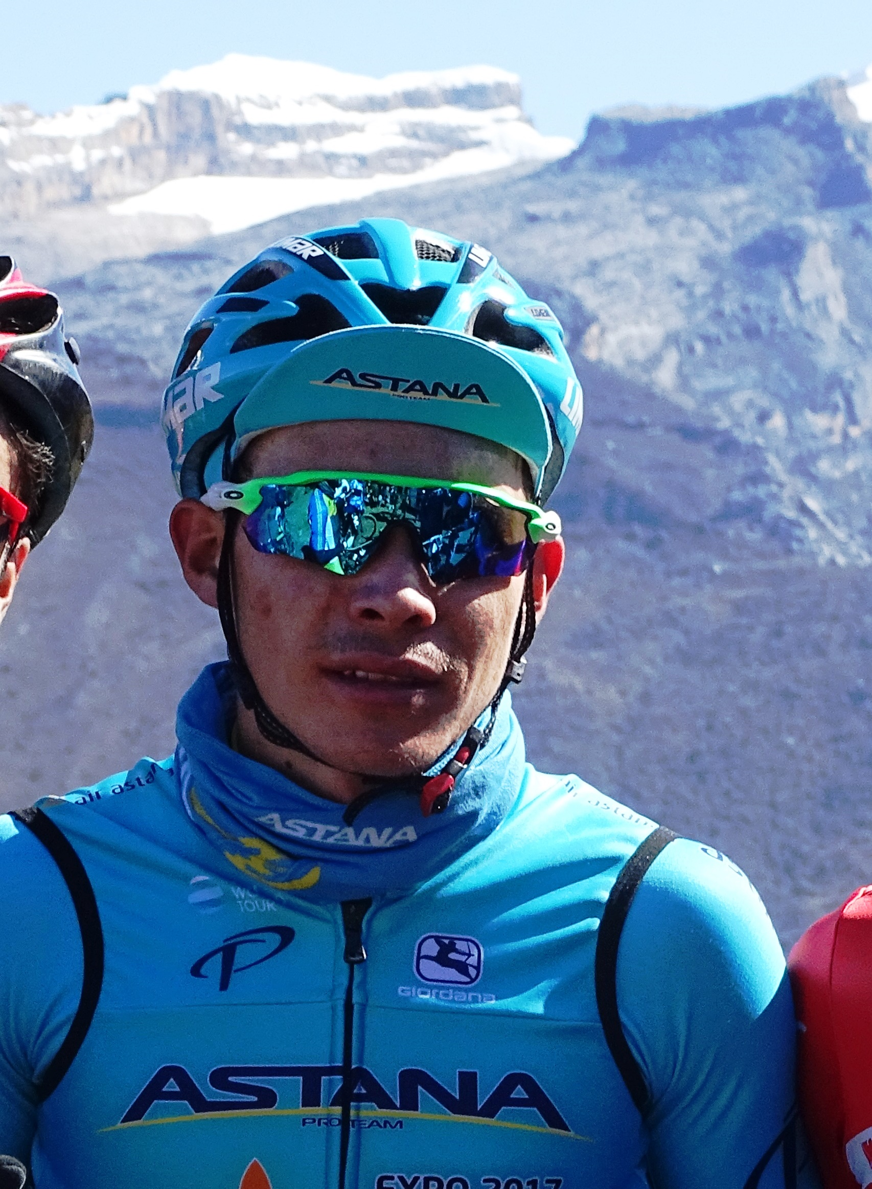 Miguel Angel Lopez en enero de 2018, El Cocuy, Boyacá, Colombia